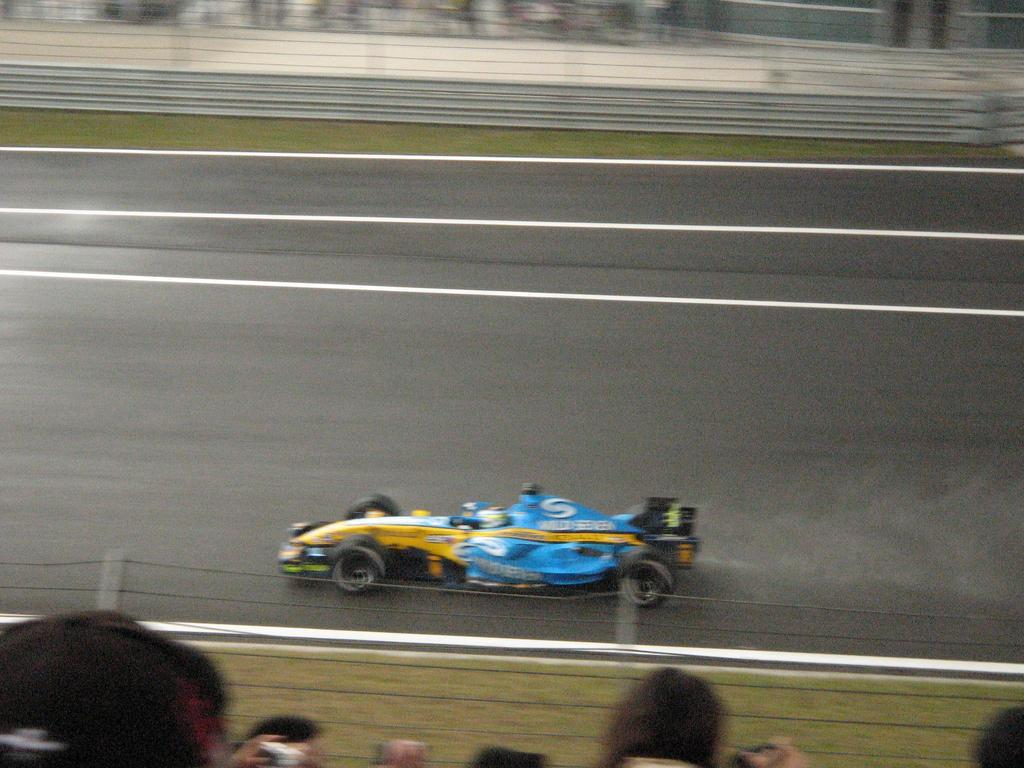 Renault China 2006